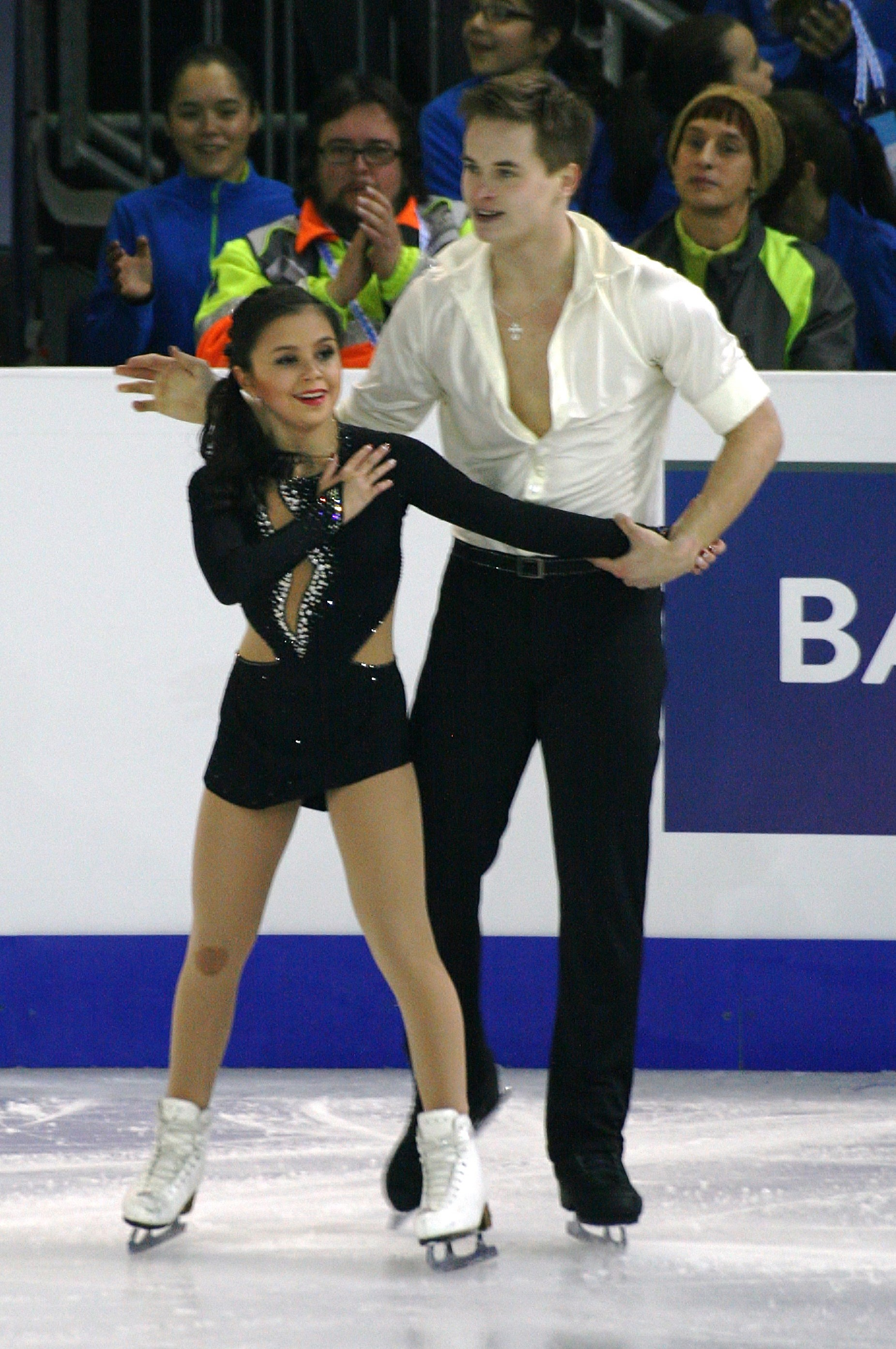 Лина Фёдорова и Максим Мирошкин (Россия) на финале Гран-при среди юниоров 2014-2015.